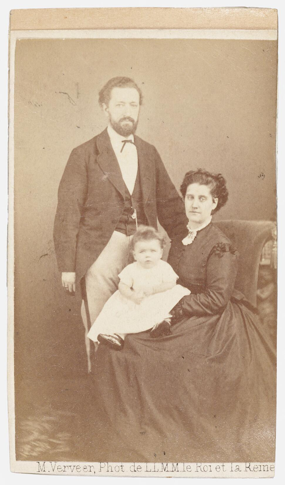 Portret van Johannes Theodorus Mouton (1840-1912), Carolina Anna Troost (1841-1900) en een kind, waarschijnlijk Johannes Martinus Cornelis Mouton (1869-1924)